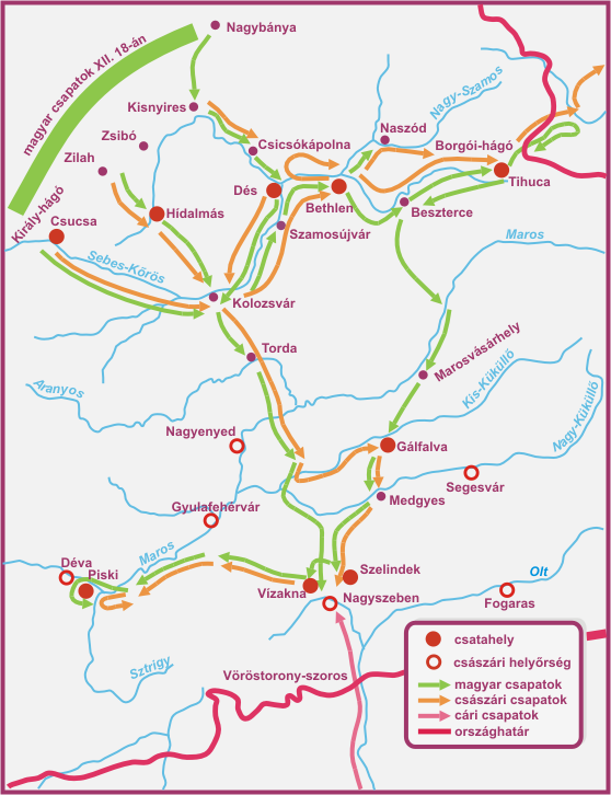 Bem erdélyi hadműveleteinek első szakasza (december 18-tól a piski csatáig)